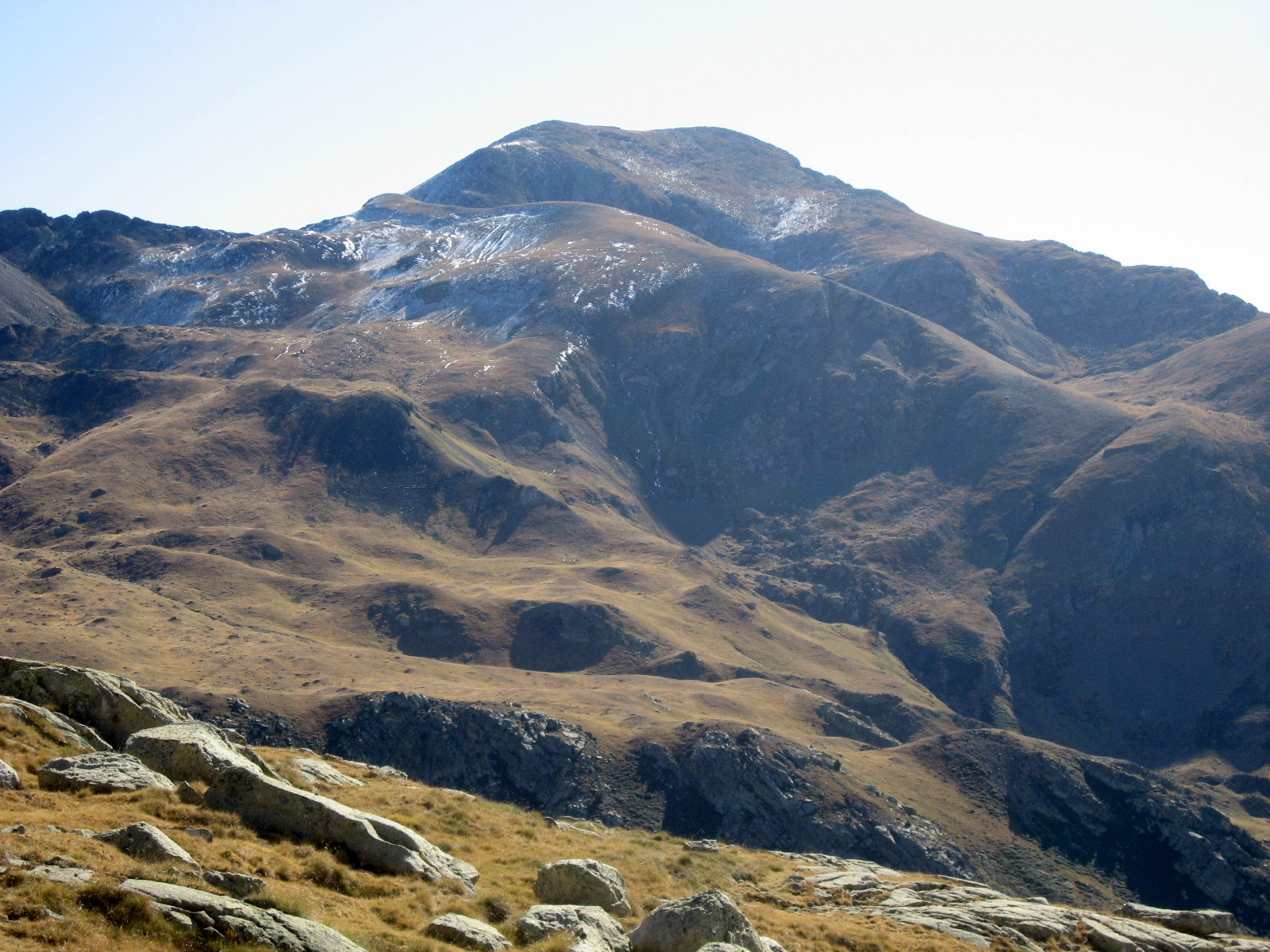 Montseny de Pallars (Vall Fosca) des de l'Estany Colomina